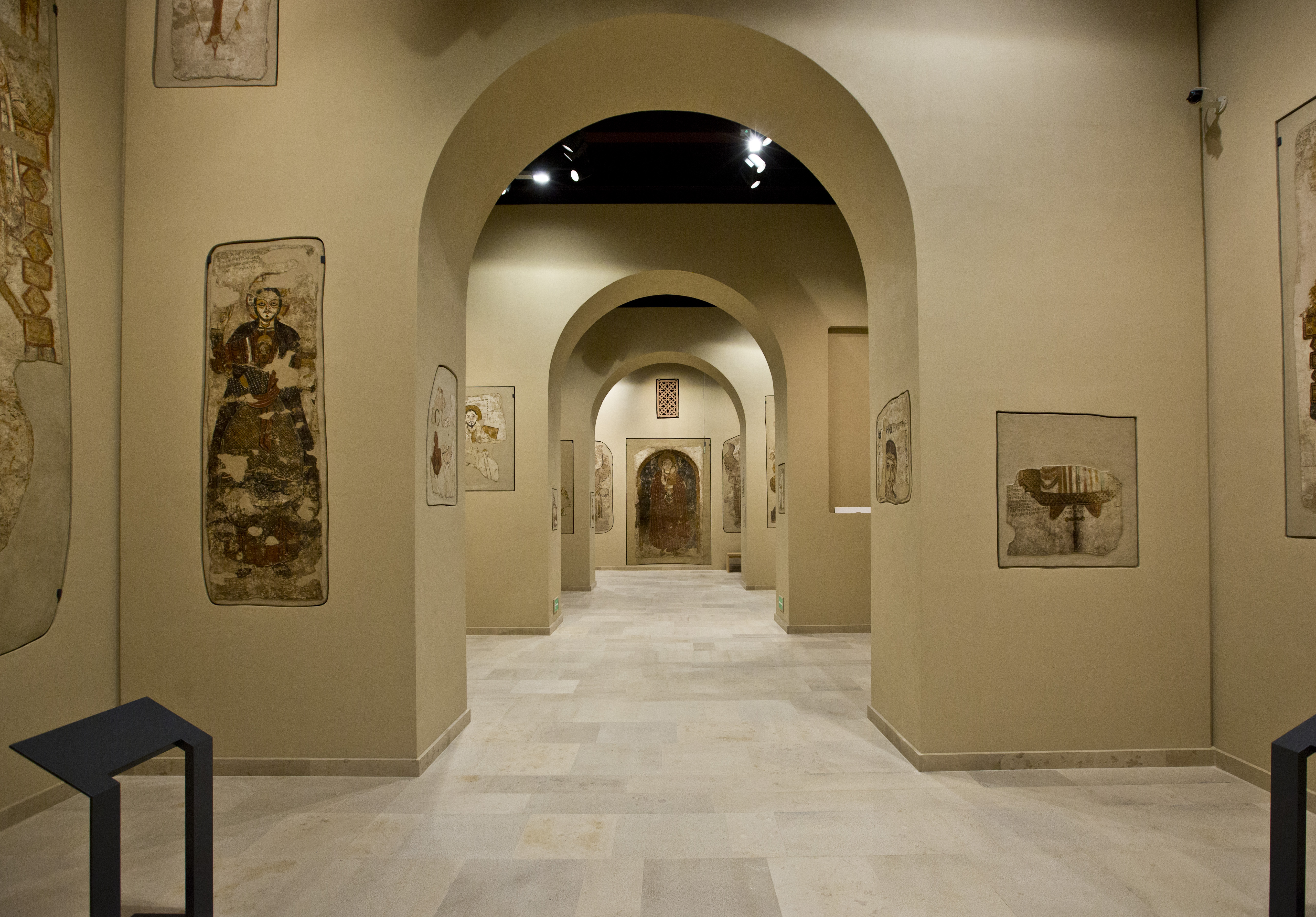 Muzeum Narodowe w Warszawie, Galeria Faras